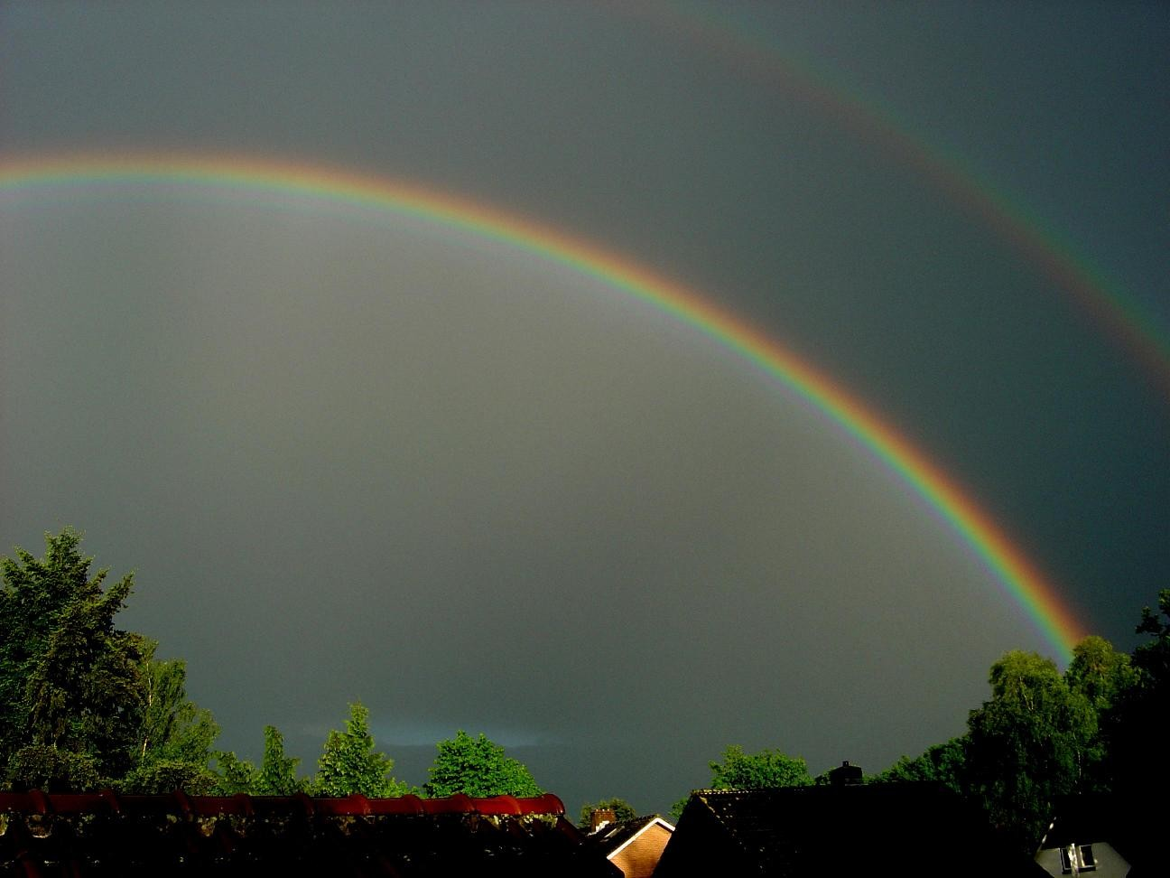 (c) 2006 W.D. van den Top, Vierhouten